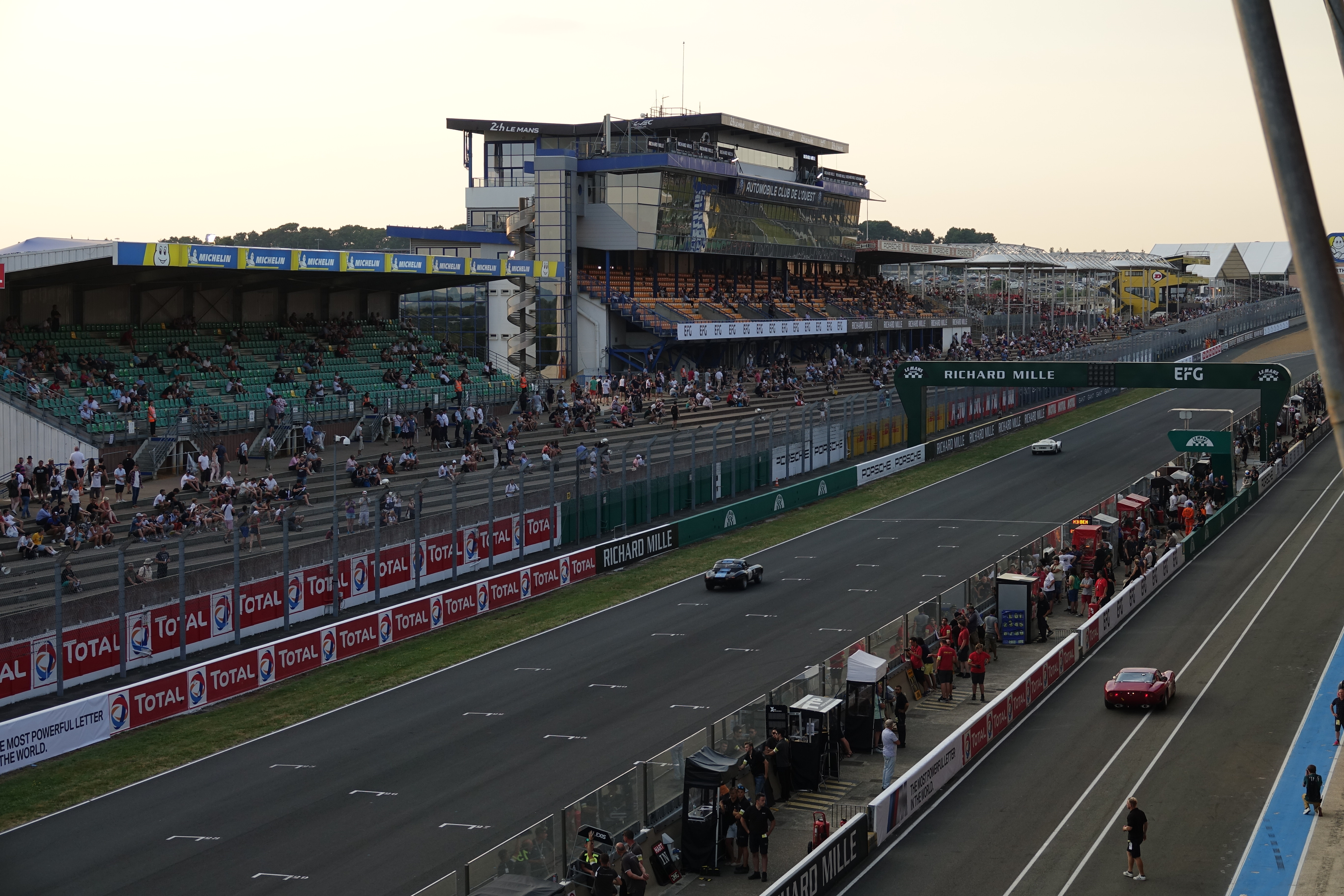 Le Mans Classic 2018